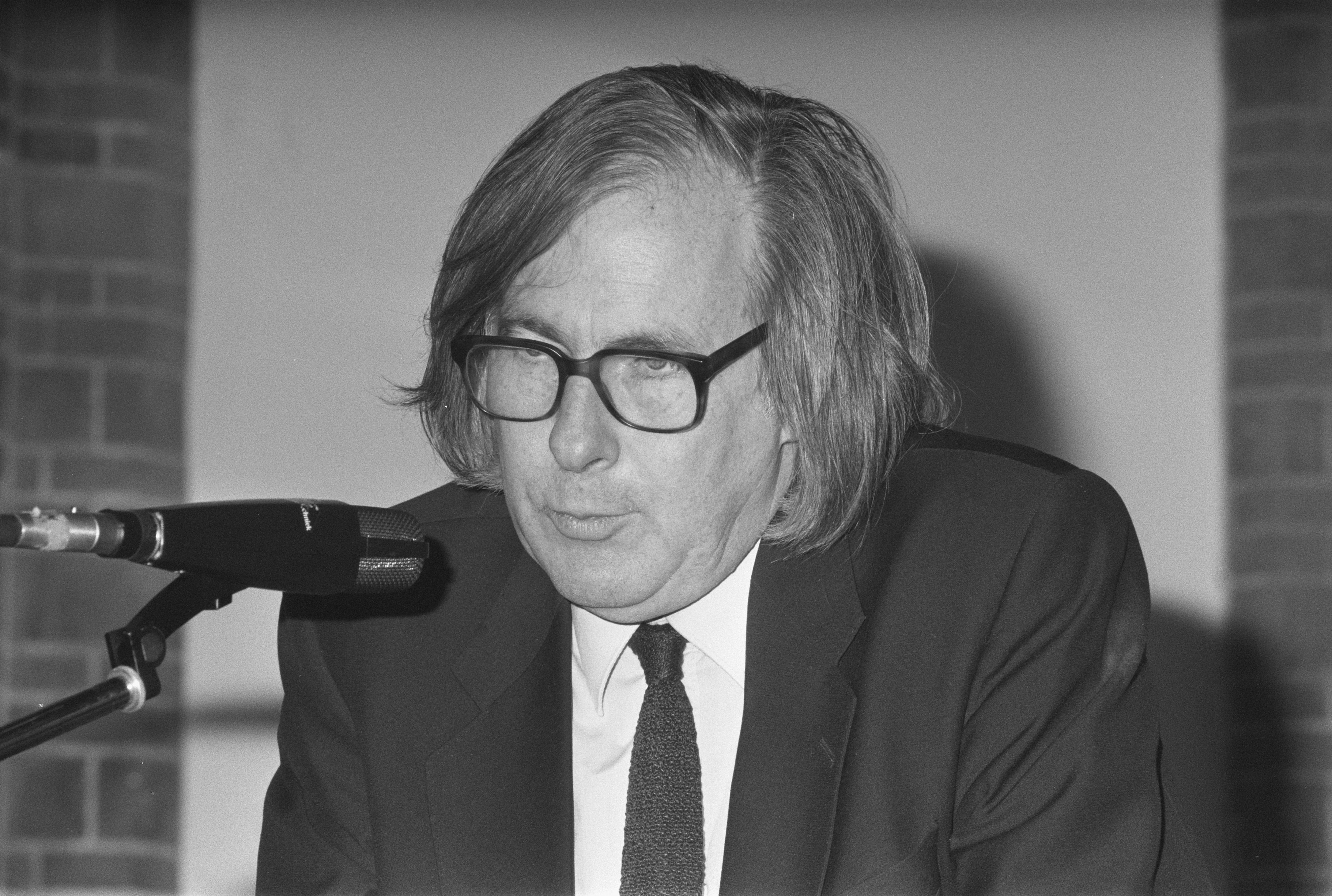 Collectie / Archief : Fotocollectie Anefo Reportage / Serie : [ onbekend ] Beschrijving : Regisseur Pieter Verhoeff en schrijfster Marijke Höweler na perspremiere "van geluk gesproken"; presentatie Fonds Victor Hugo; Wim Verstappen Datum : 17 november 1987 Trefwoorden : Regisseurs, premieres, schrijfsters Persoonsnaam : Verhoeff, Pieter, Verstappen, Wim Fotograaf : Bogaerts, Rob / Anefo Auteursrechthebbende : Nationaal Archief Materiaalsoort : Negatief (zwart/wit) Nummer archiefinventaris : bekijk toegang 2.24.01.05 Bestanddeelnummer : 934-1312